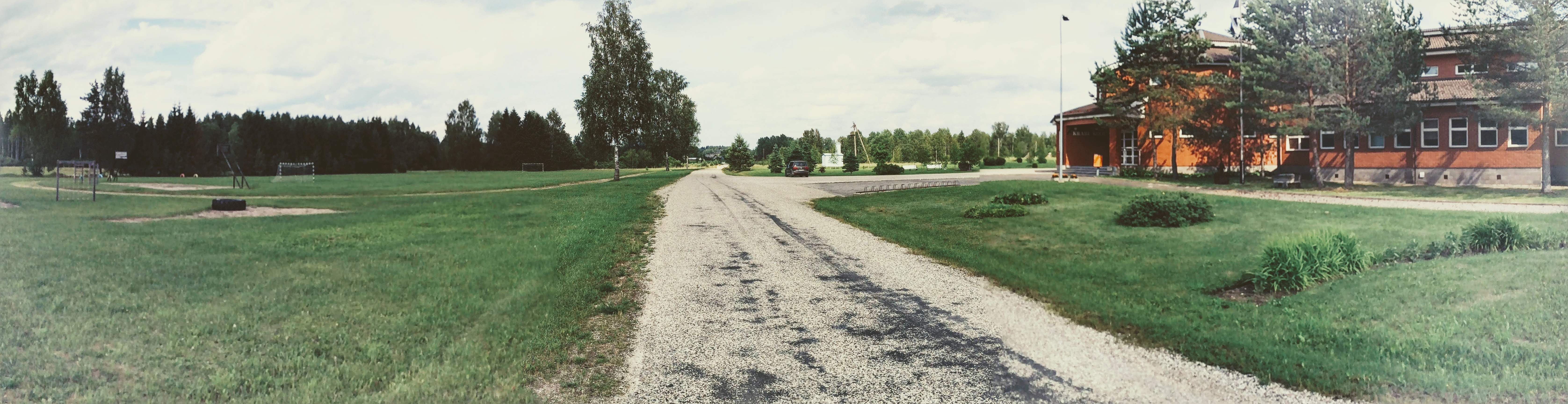 Panoraamvaade vana koolimaja poolt Krabi küla poole, paremal koolimaja ja vasakul kooli spordiplats